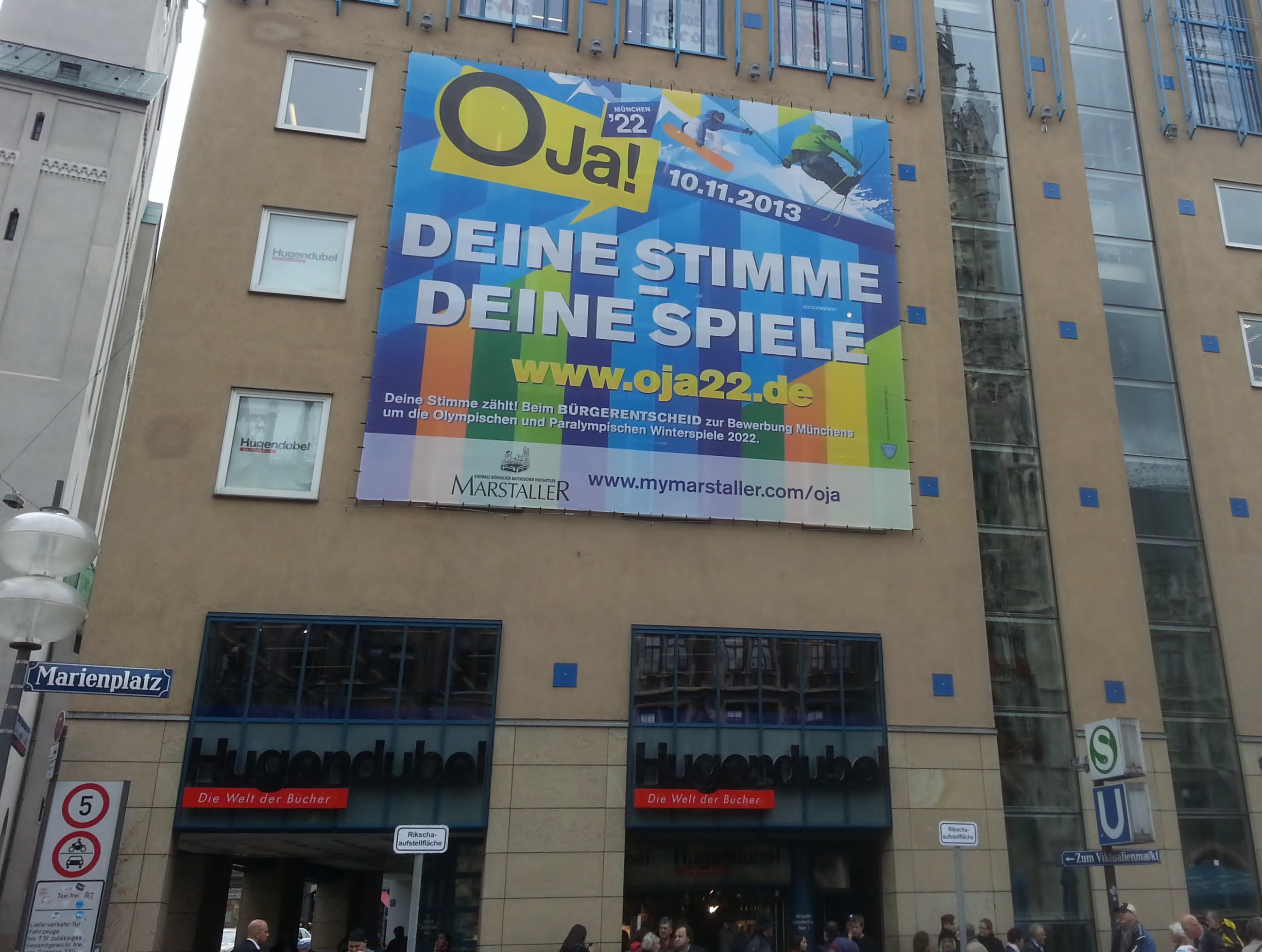 Wernbung zur Ja-Stimme des Münchner Volksbegehren 2013 zu den Olympischen Winterspielen 2022 am Münchner Marienplatz über dem Hugendubel